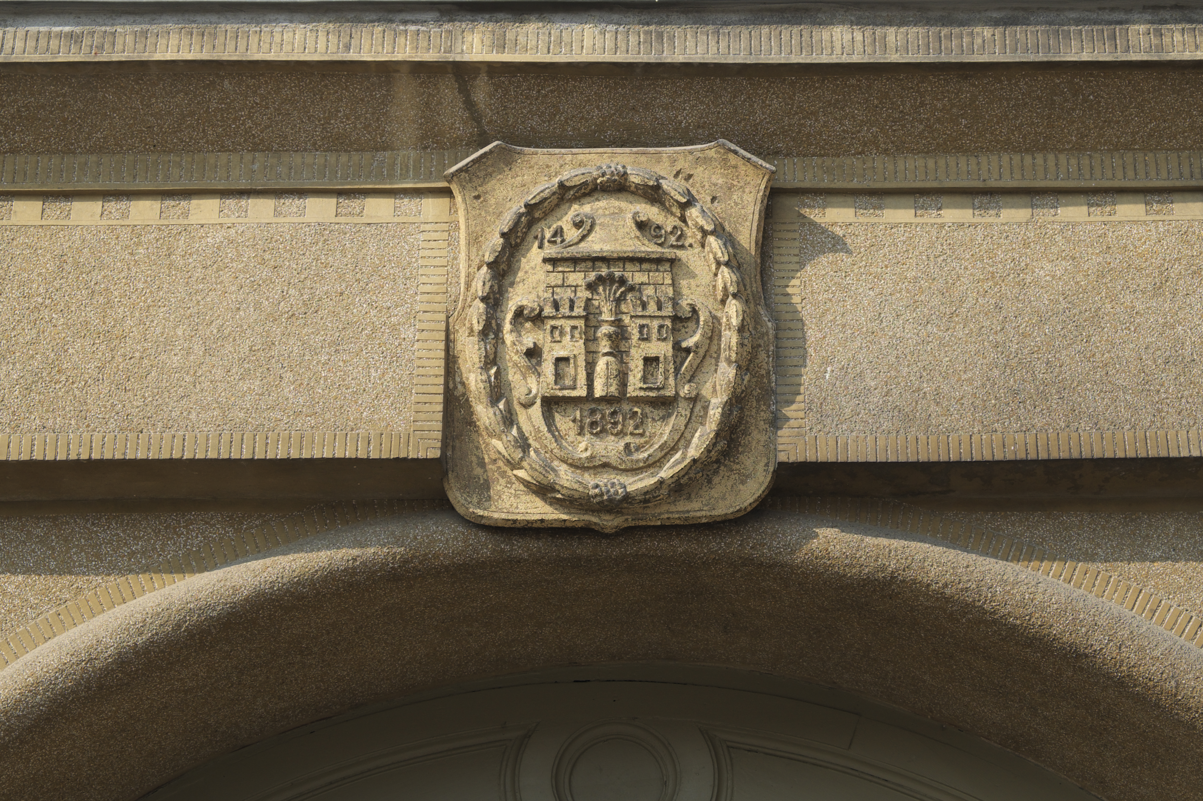 Rathaus in Tovačov im Okres Přerov in der Olmützer Region in Tschechien, Wappen